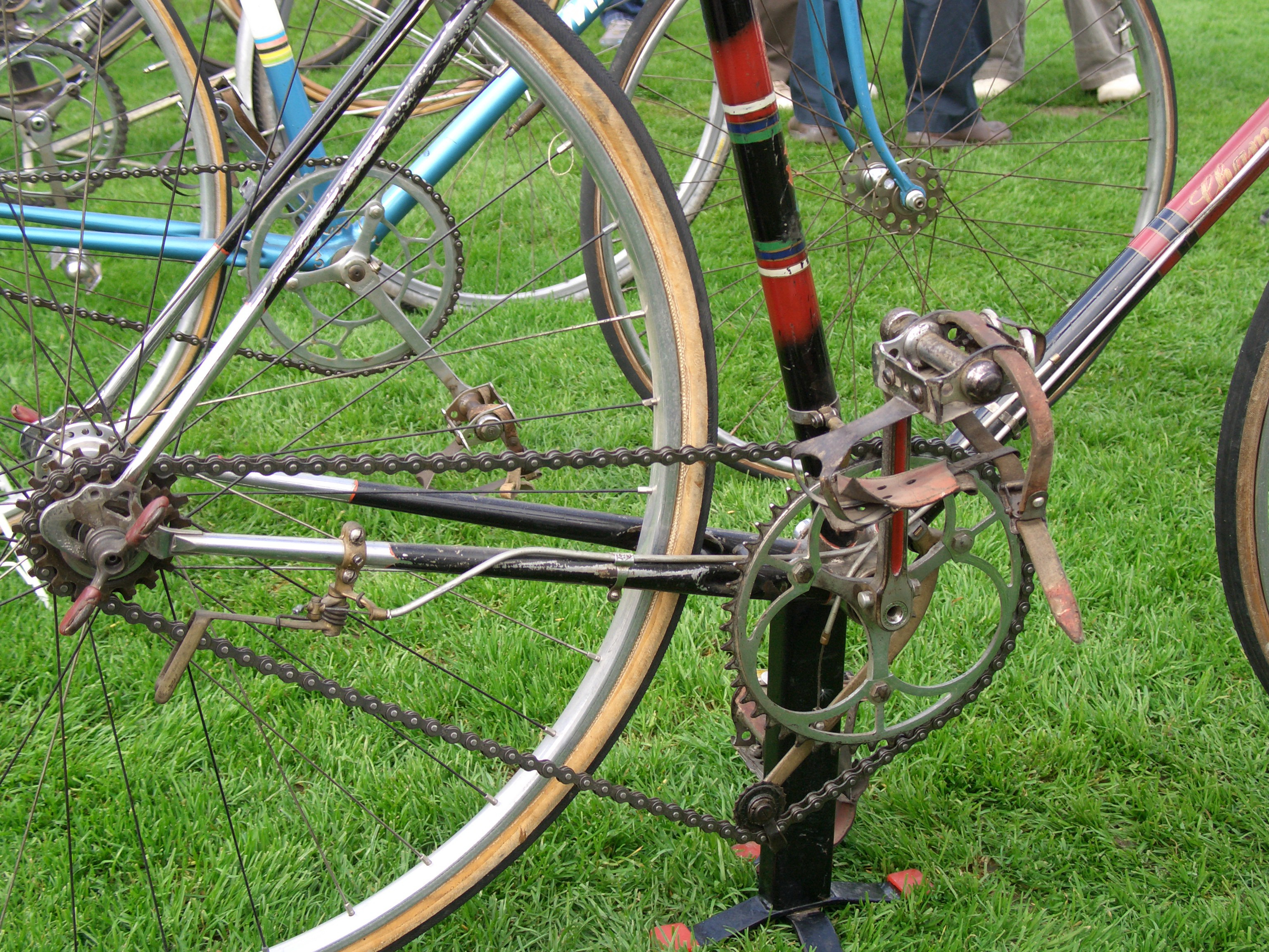 Champion-Straßen-Rennrad von Köthke, Köln, ca. 1930